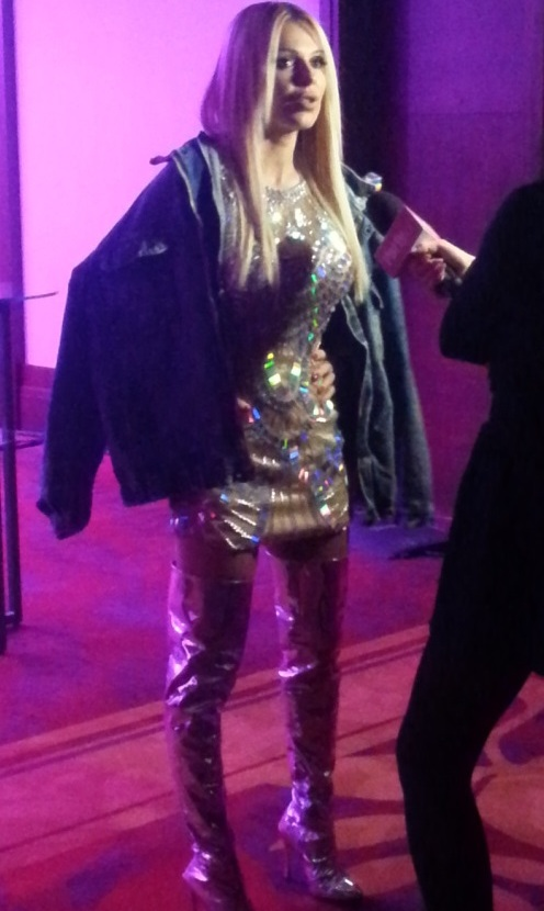 Polska piosenkarka Dorota "Doda" Rabczewska podczas konferencji "Ramię w ramię po równość" Kampanii Przeciw Homofobii; Warszawa, 13 października 2016